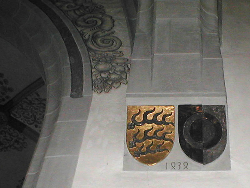 Wappenstein datiert 1434 in der Stadtkirche in Murrhardt